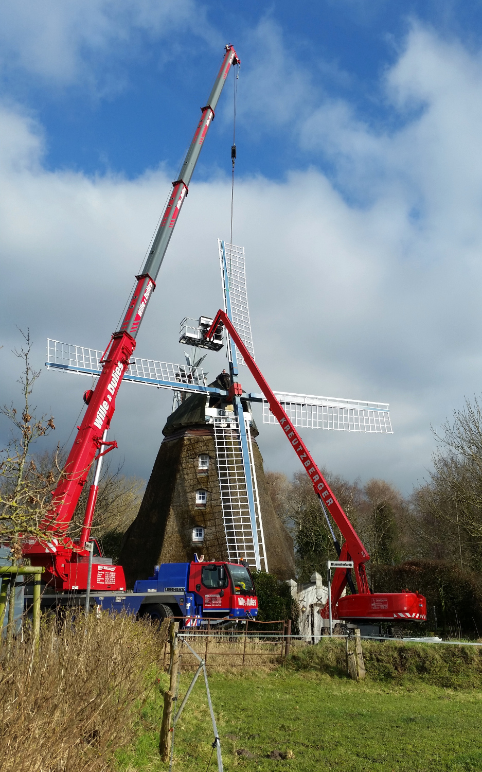 am 14. Februar 2020 bekommt die Mühle Fortuna neue Flügelbäume und Jalousien